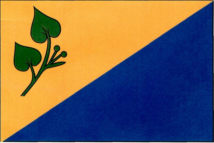 Vlajka, Únice, okres Strakonice